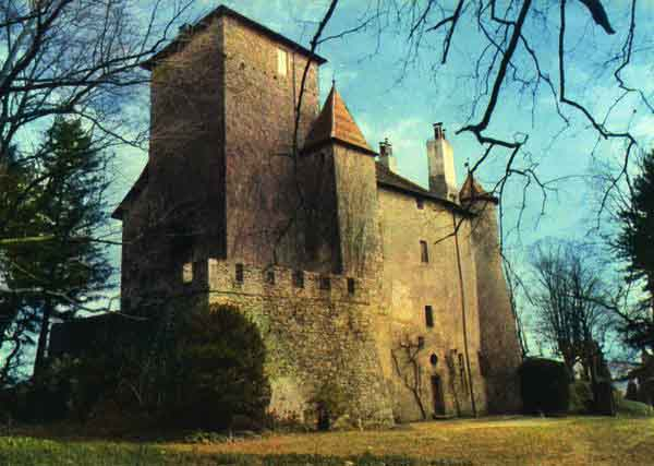 Château où Imbert de Batarnay et Louis XI se seraient rencontrés, il se trouve sur la commune de Charmes-sur-l'Herbasse.